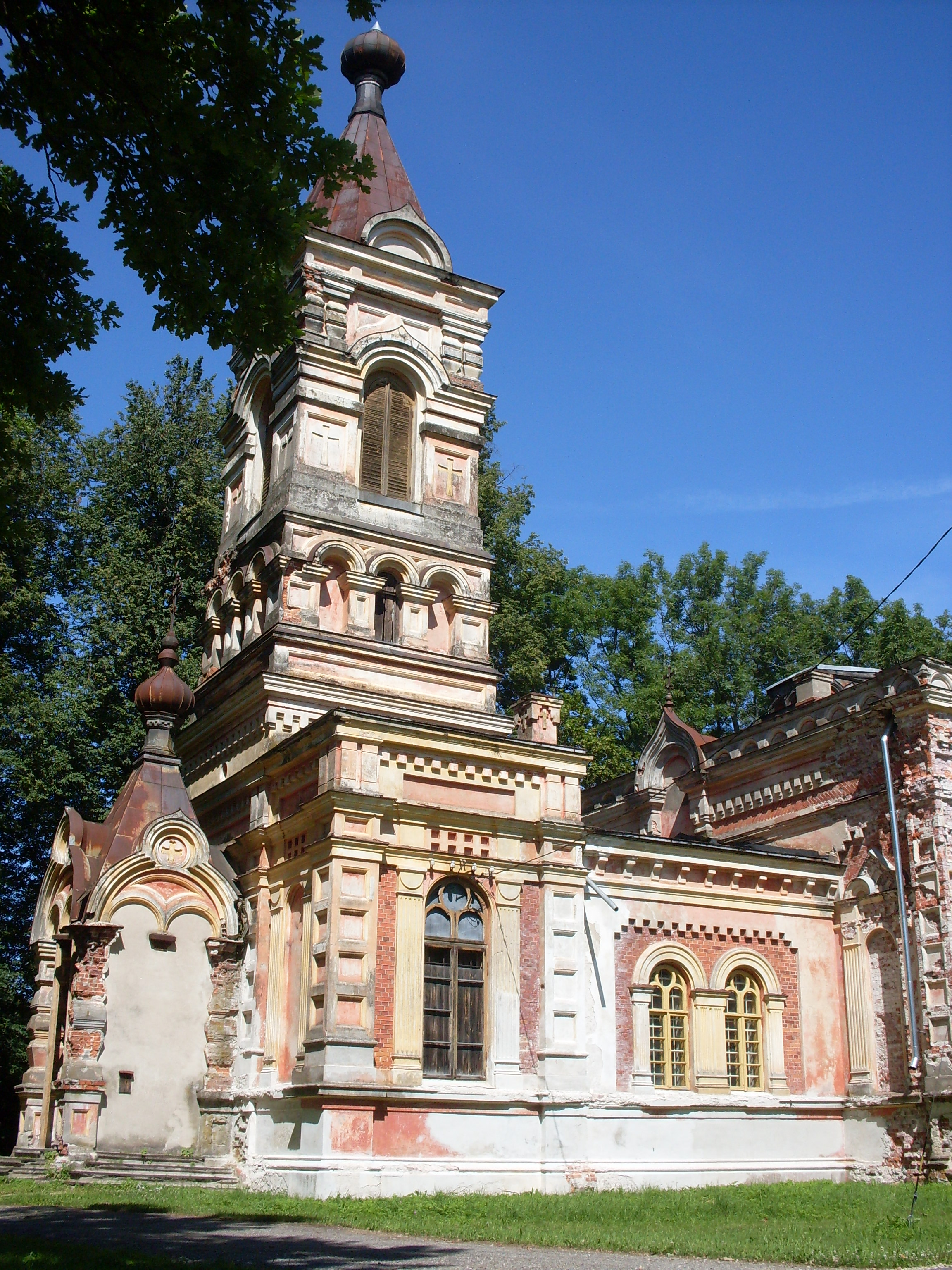 Sindi õigeusu kirik